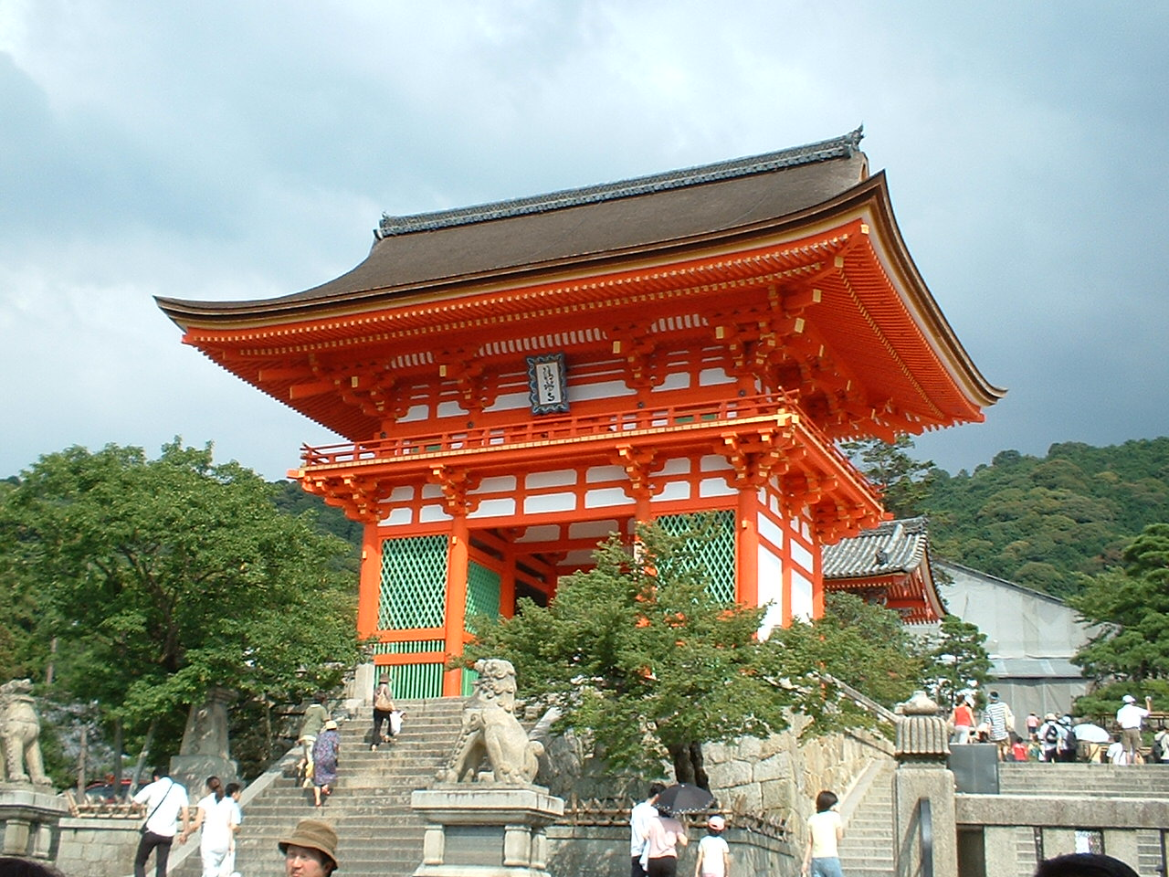 Kiyomizudera niou gate (清水寺仁王門)